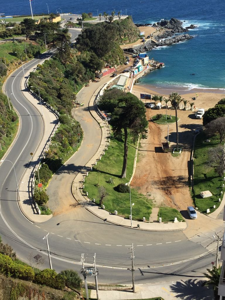 Playa Las Torpederas el 25 de agosto de 2018